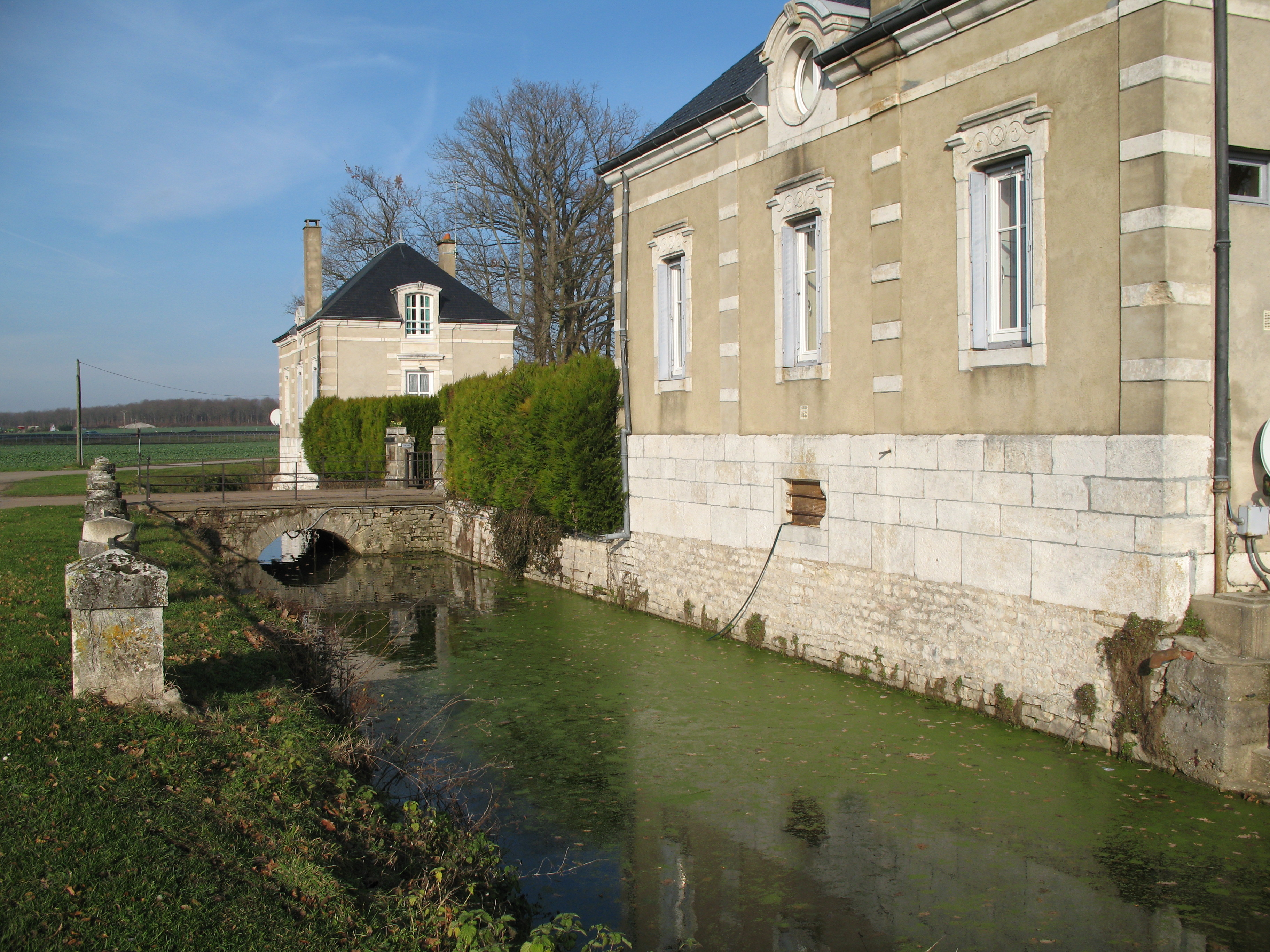 château de la Loyère (Saône-et-Loire)